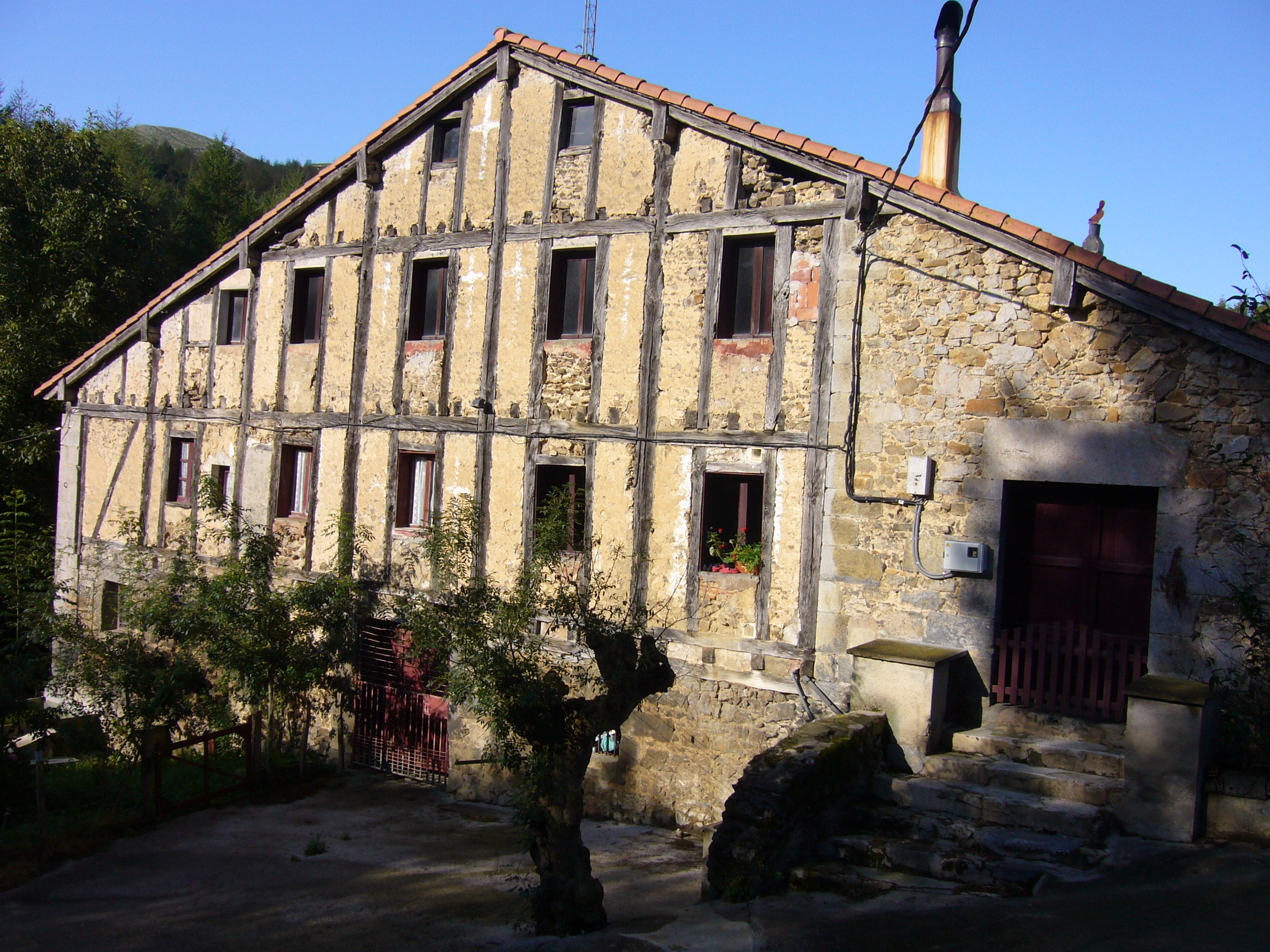 Iturriotz baserr eta benta. Ondare izendatutako eraikina.